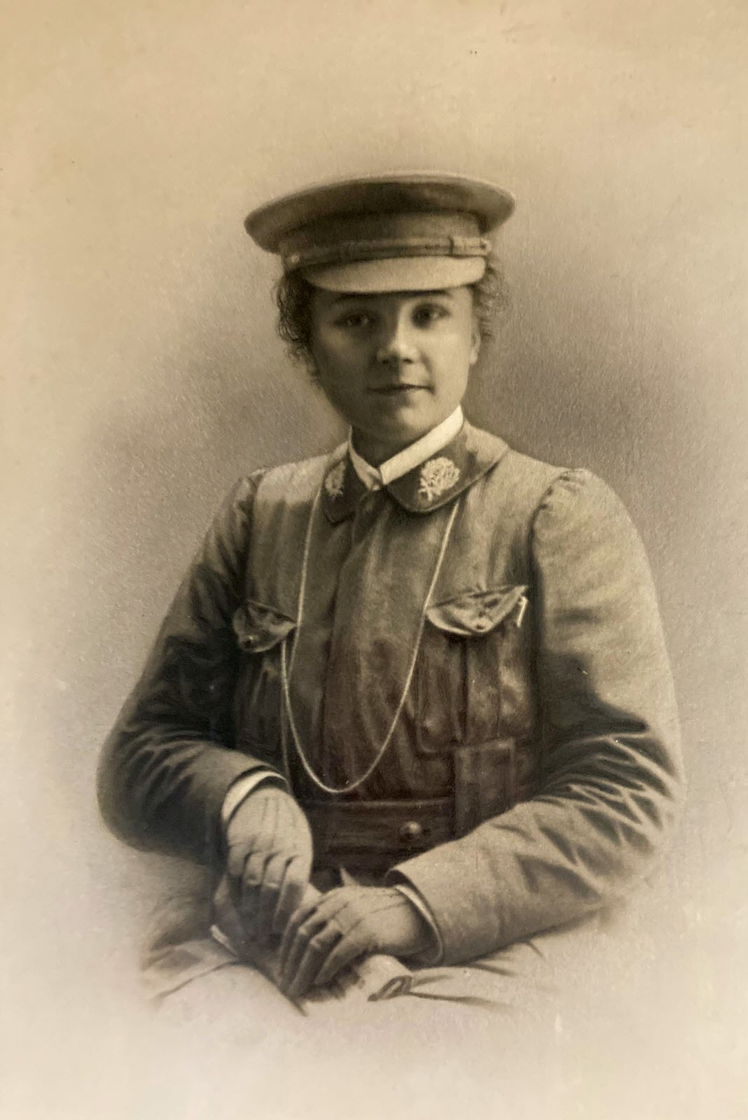 Nicole Girard-Mangin (1878-1919) Première femme médecin à exercer durant la première guerre mondiale